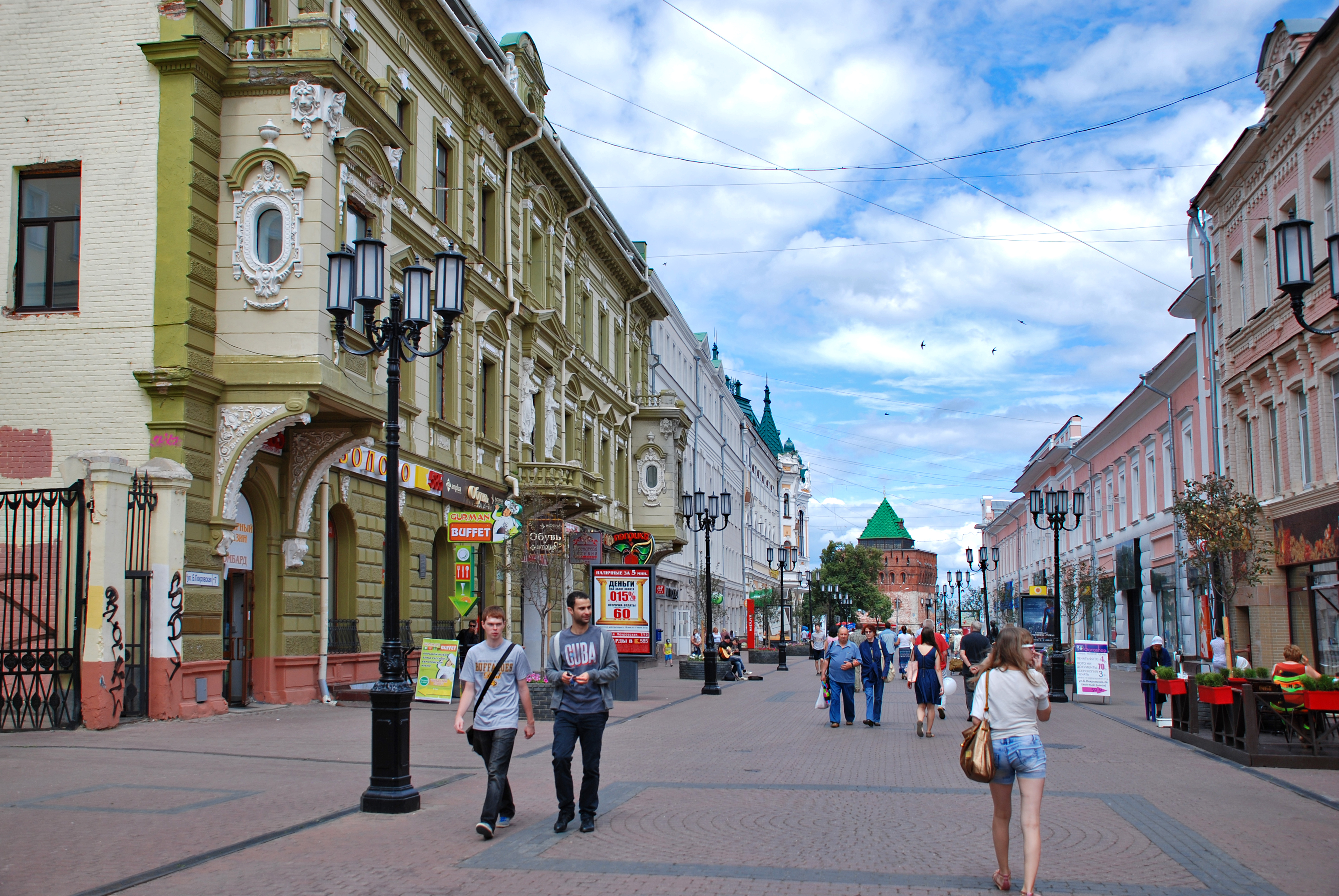 Дом торговой фирмы Фроловых (Нижегородская область, Нижний Новгород, улица Большая Покровская, 7)